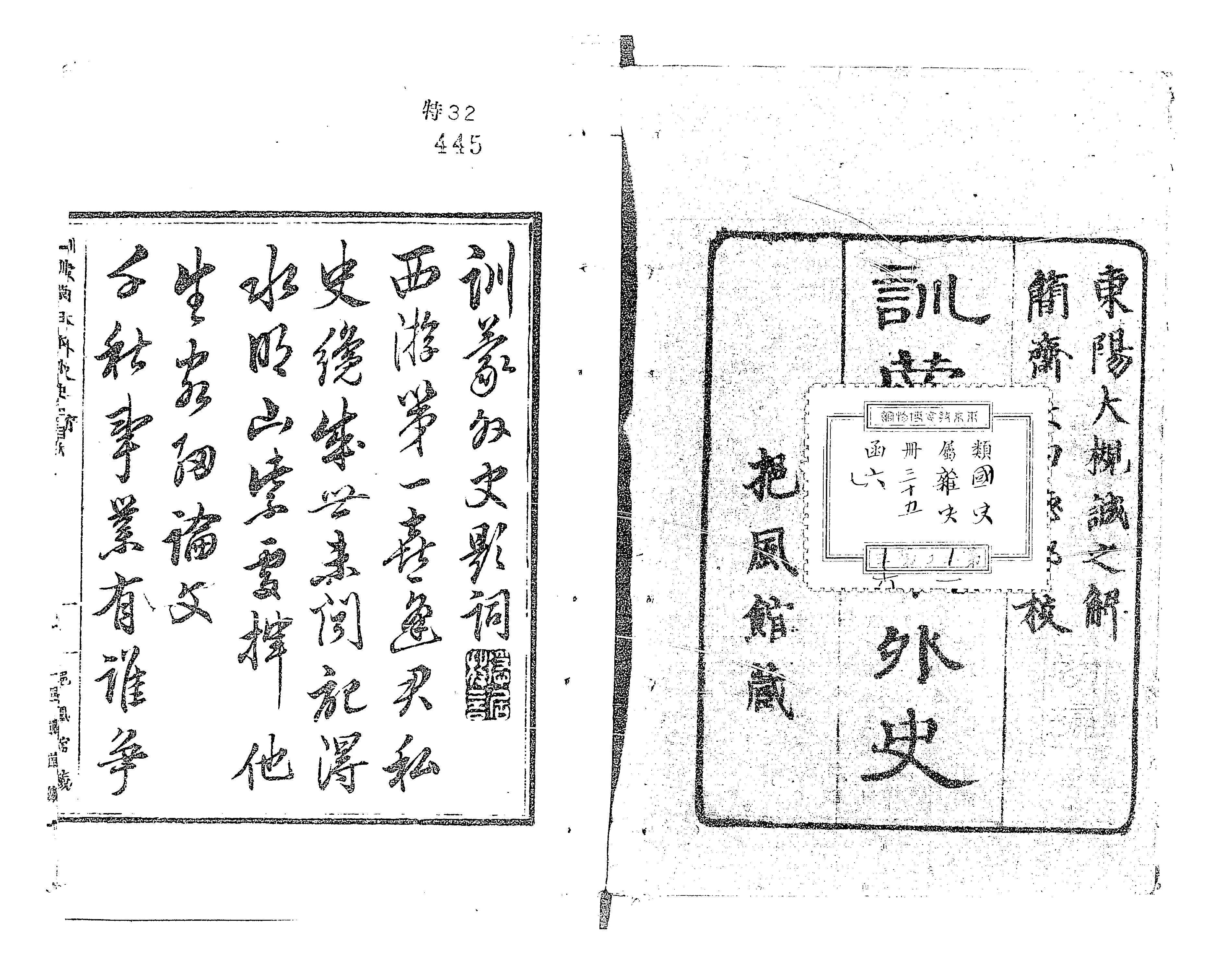 Титульный лист Нихон гайси 1874 года издания